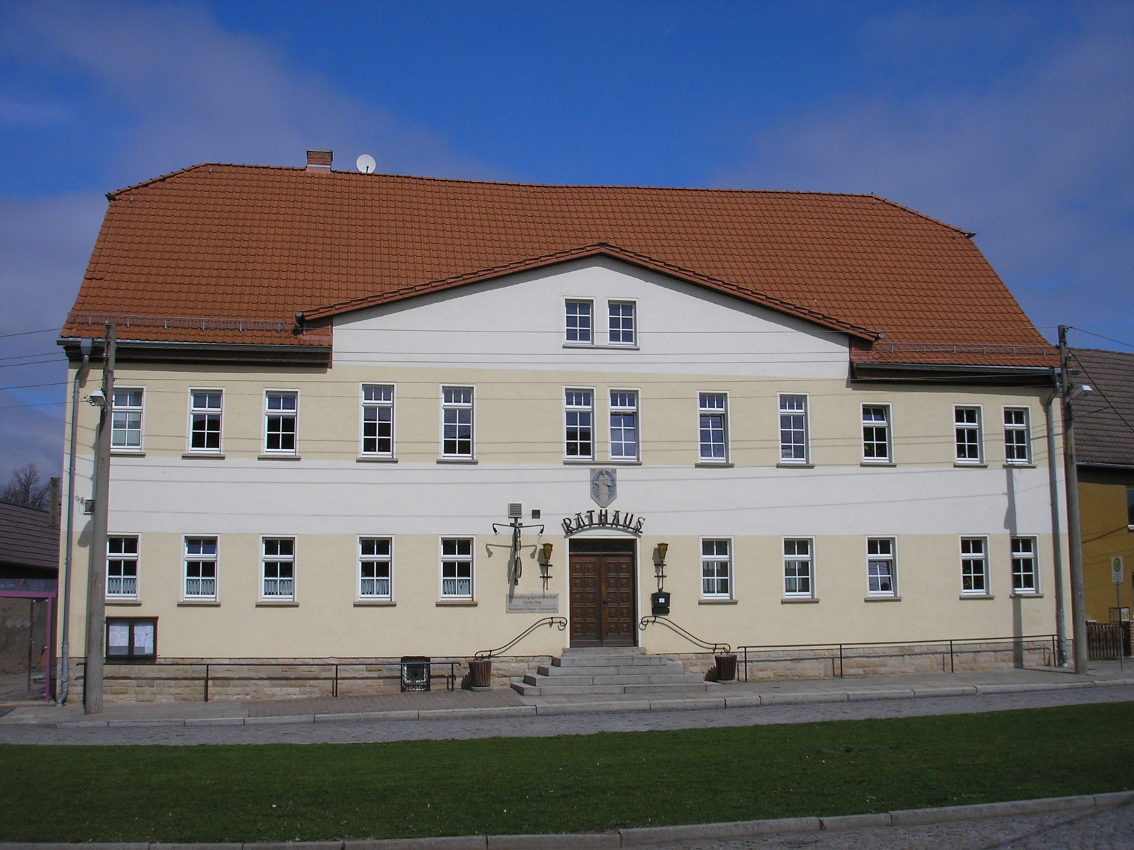 Das Rathaus am Markt in Gebesee (Thüringen).